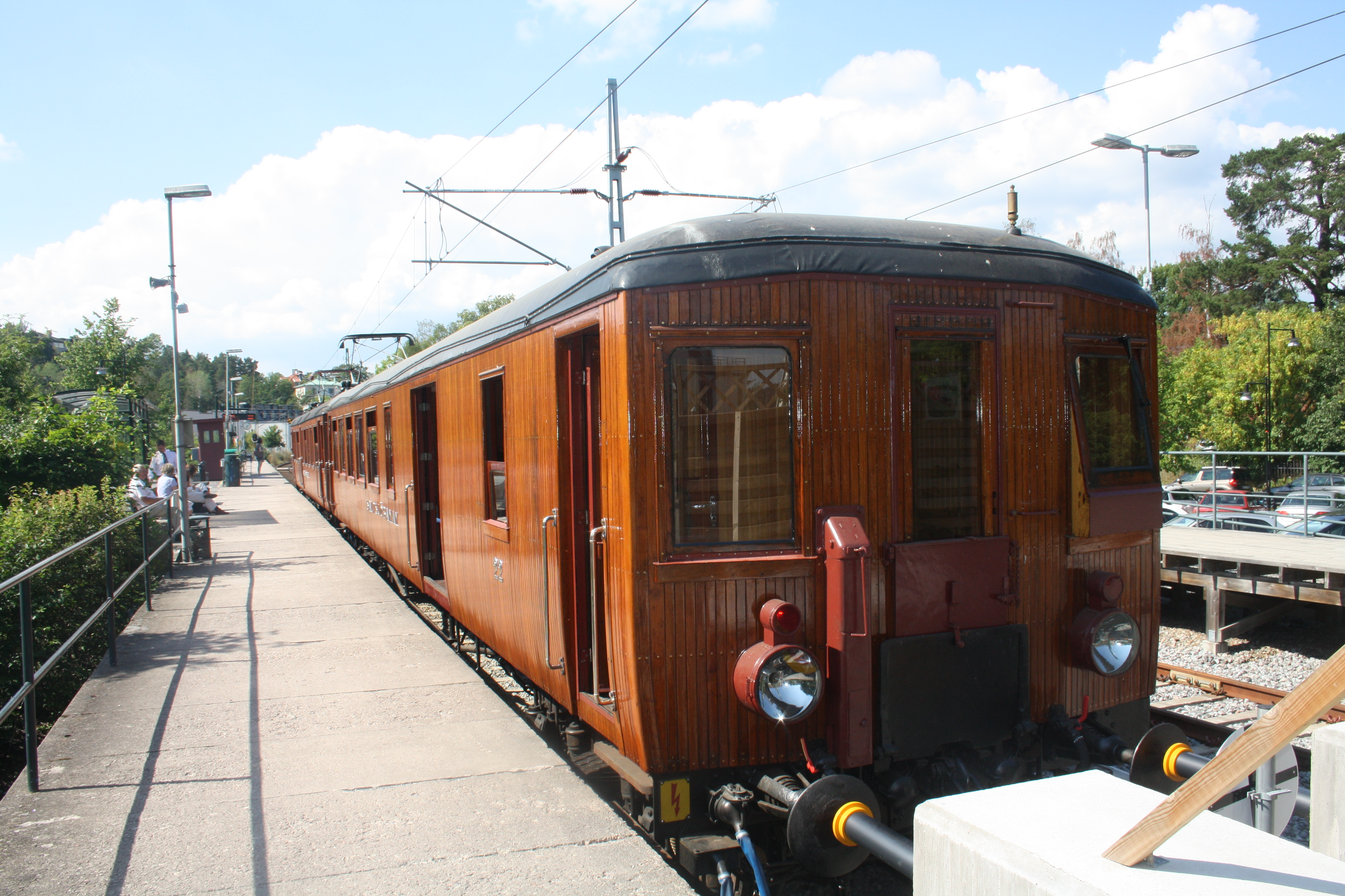 Saltsjöbanan - Museumvagnar 9 augusti 2014